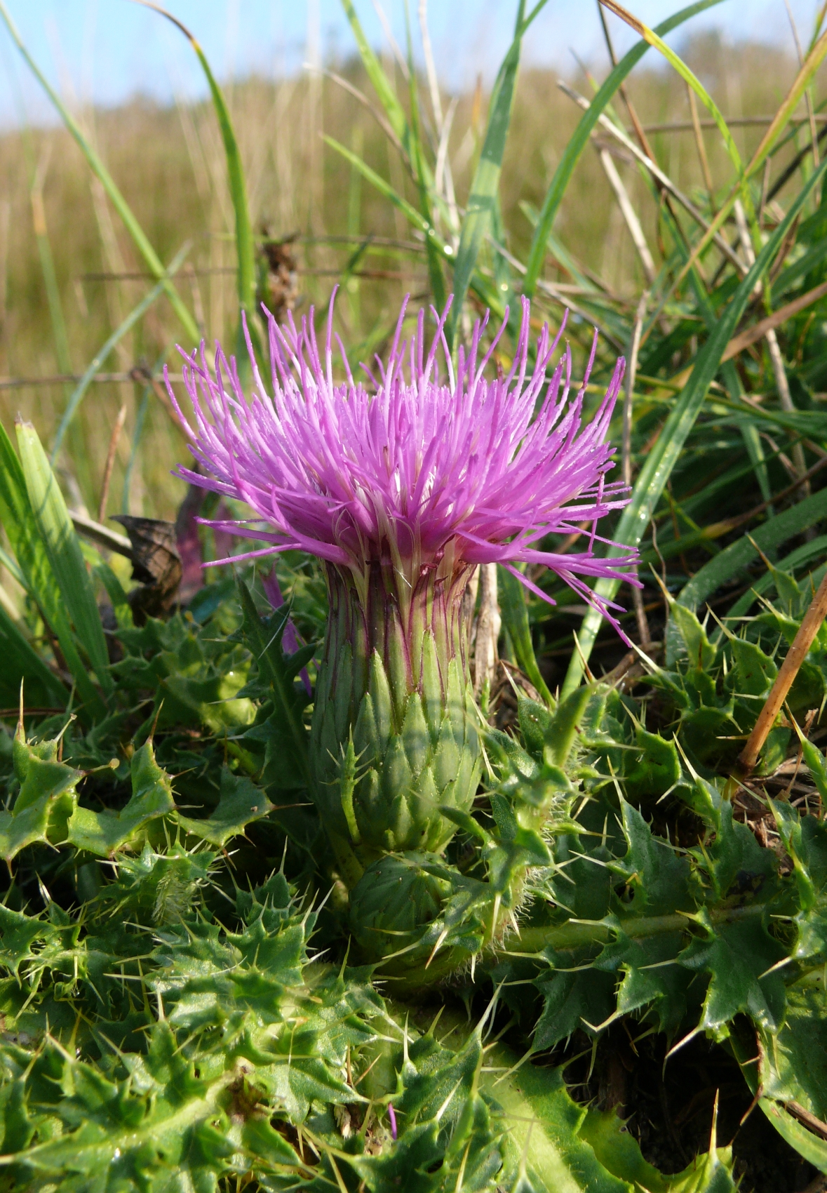 Cirsium acaule, Schwäbisch-Fränkische Waldberge, Germany